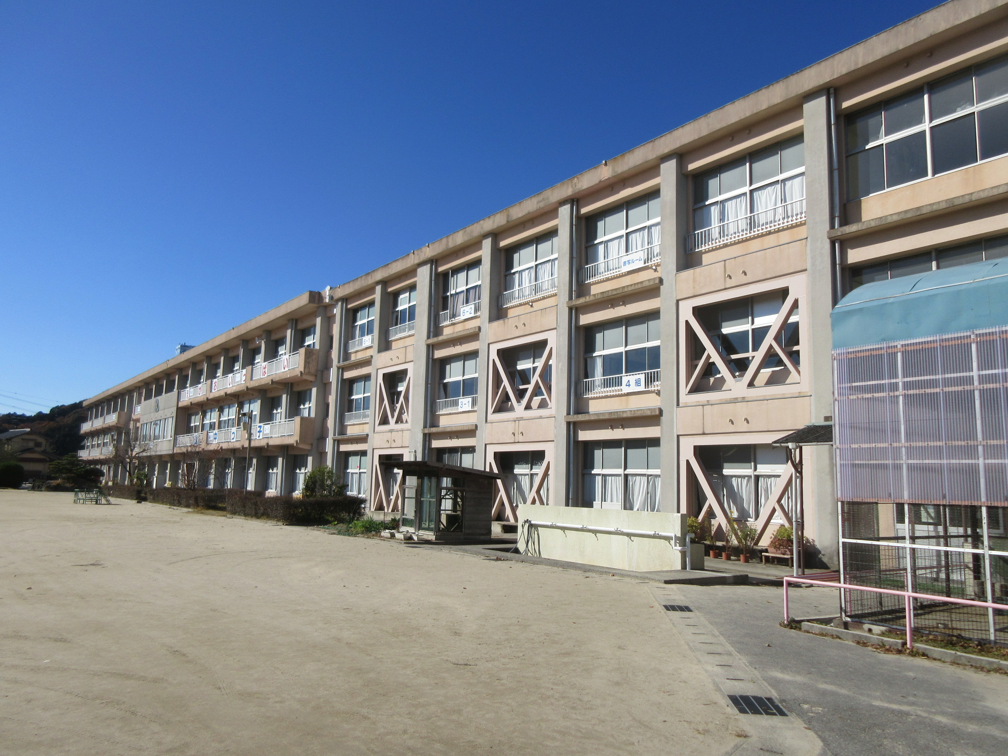 岡崎市立山中小学校（岡崎市舞木町）